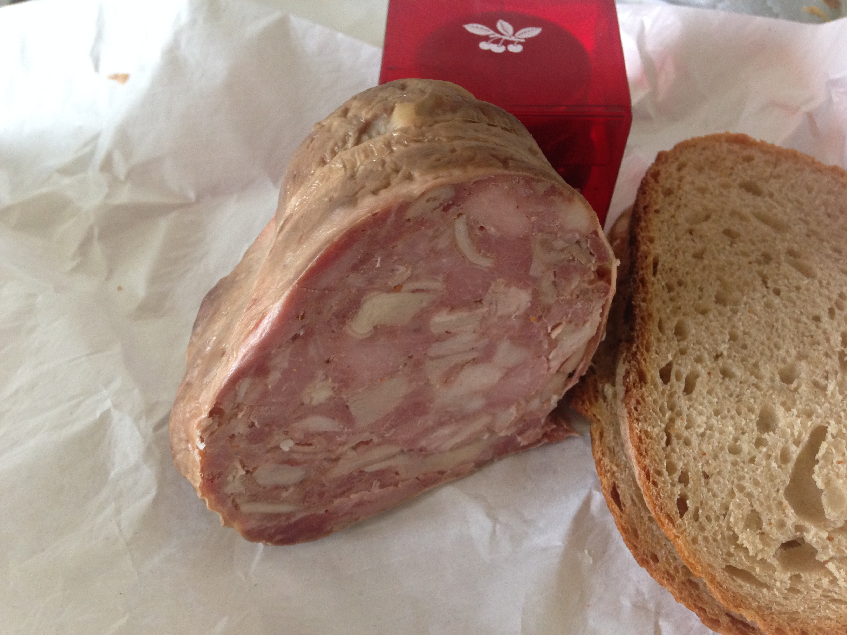 Morceau de gandeuillot à côté d'une tranche de pain et d'une boite de Griottines de Fougerolles.